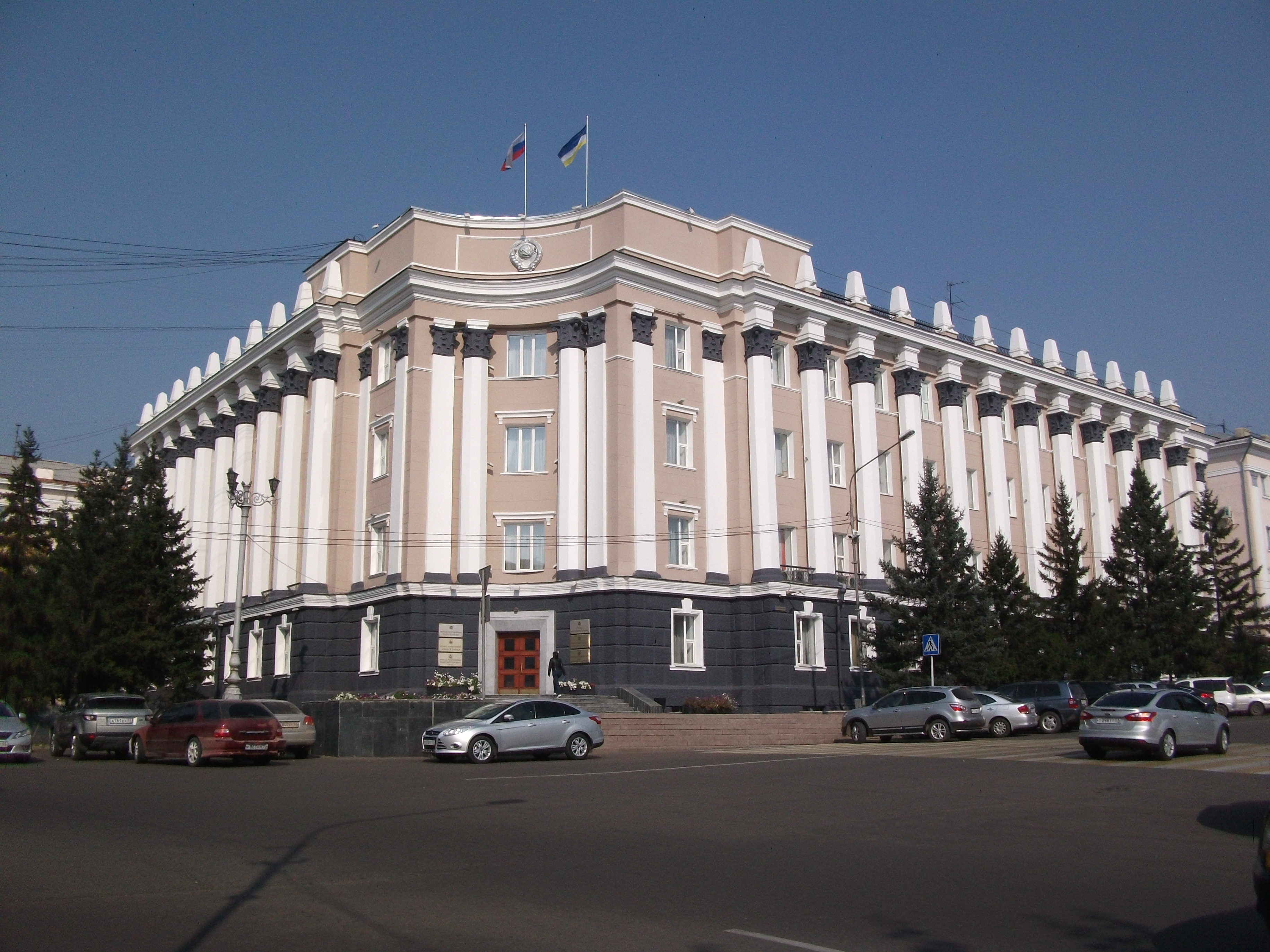 Здание обкома КПСС: улица Ленина, 54 (64), Улан-Удэ, Бурятия